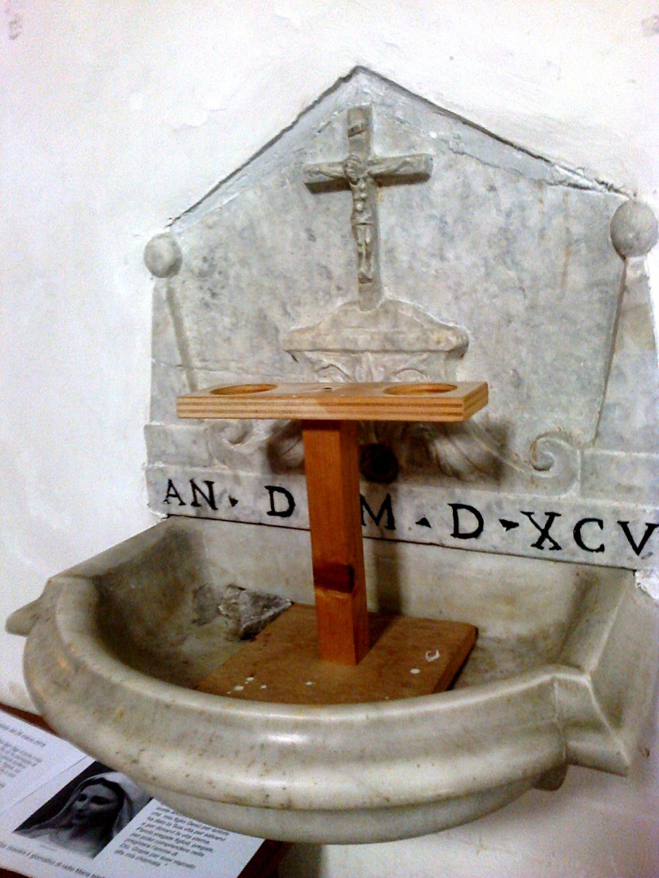 Lavabo con crocifissione della chiesa di san Marcello Centurione di Musicile di Portico